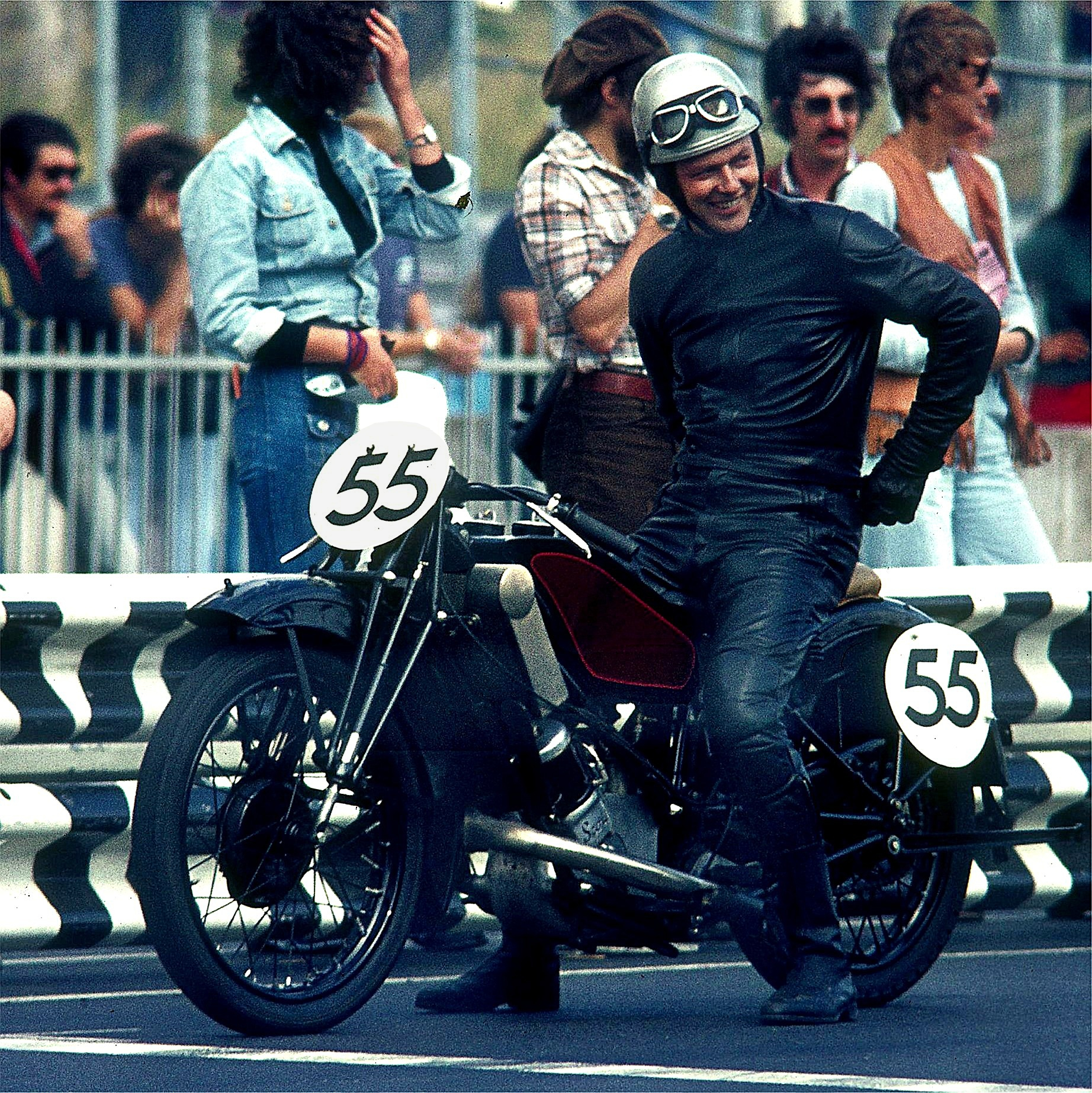 Scott-TT-Replica, Zweizylinder-Zweitaktmotor, 600 cm³, Wasserkühlung; Baujahr 1929/30